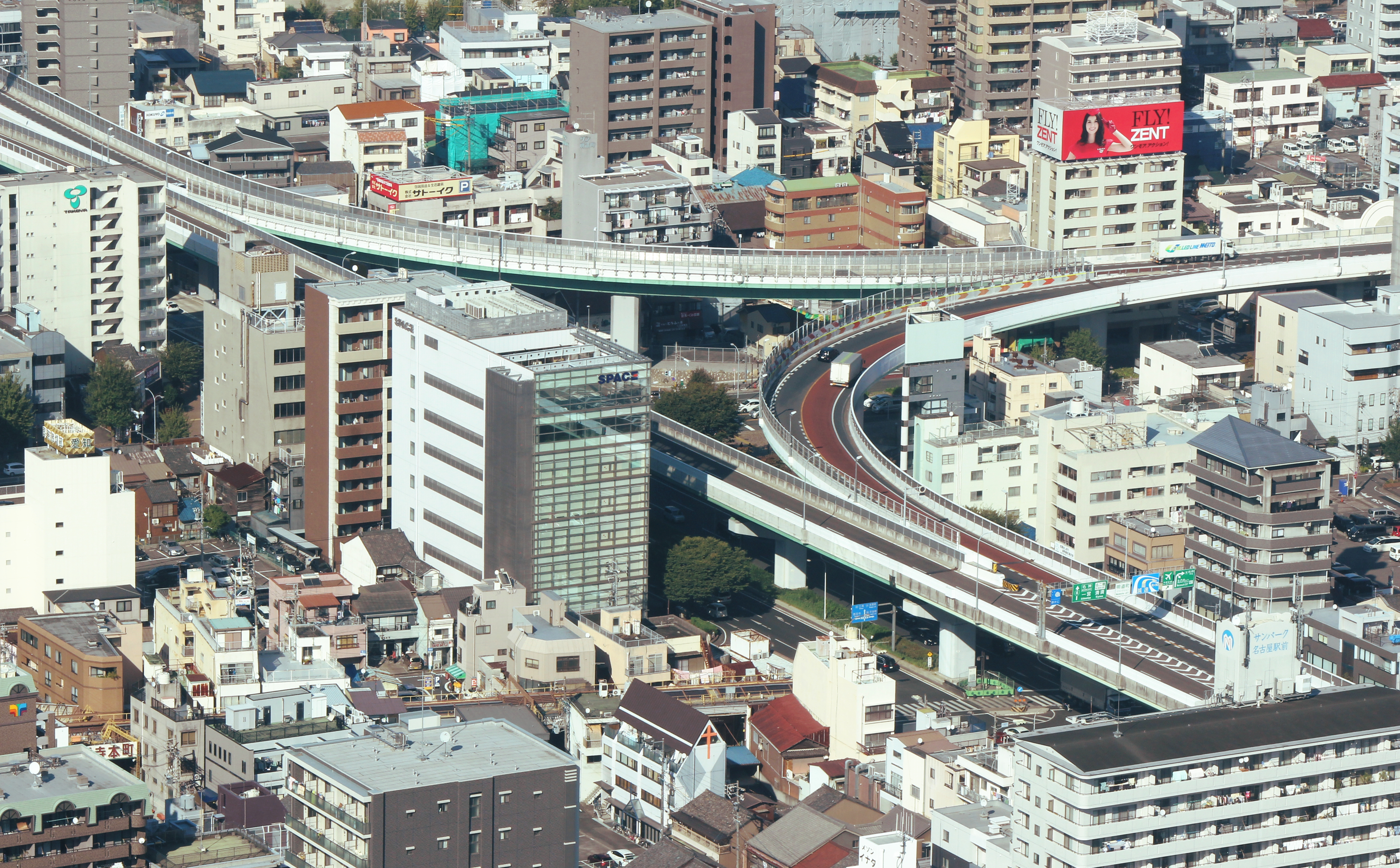 名古屋高速 明道町JCT（ミッドランドスクエアから撮影）